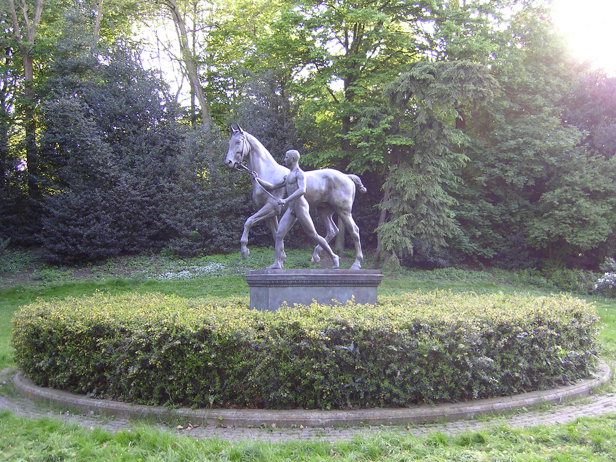 53°04′36.52″N 8°48′49.64″E / 53.0768111°N 8.8137889°E "Der Rosselenker" Statue von Louis Tuaillon Standort: Bremen, Wallanlagen Das abgebildete Objekt ist ein geschütztes Kulturdenkmal in der Freien Hansestadt Bremen, mit der Nr. 1193,T004 beim Landesamt für Denkmalpflege registriert.